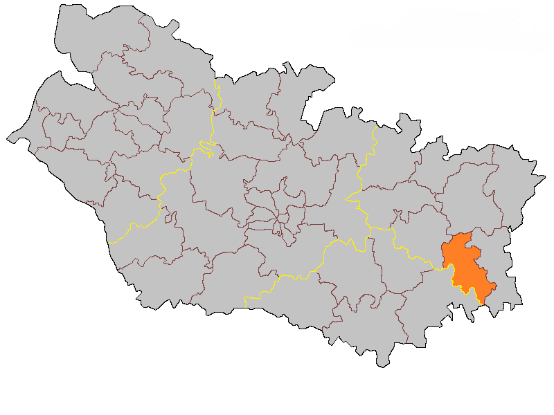 Кантон Нель на карте департамента Сомма